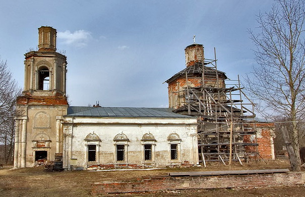 Церковь в честь Казанской иконы Божией Матери. Село Брыньково Московской области. Год постройки 1701.